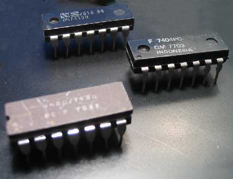 Integrovane obvody